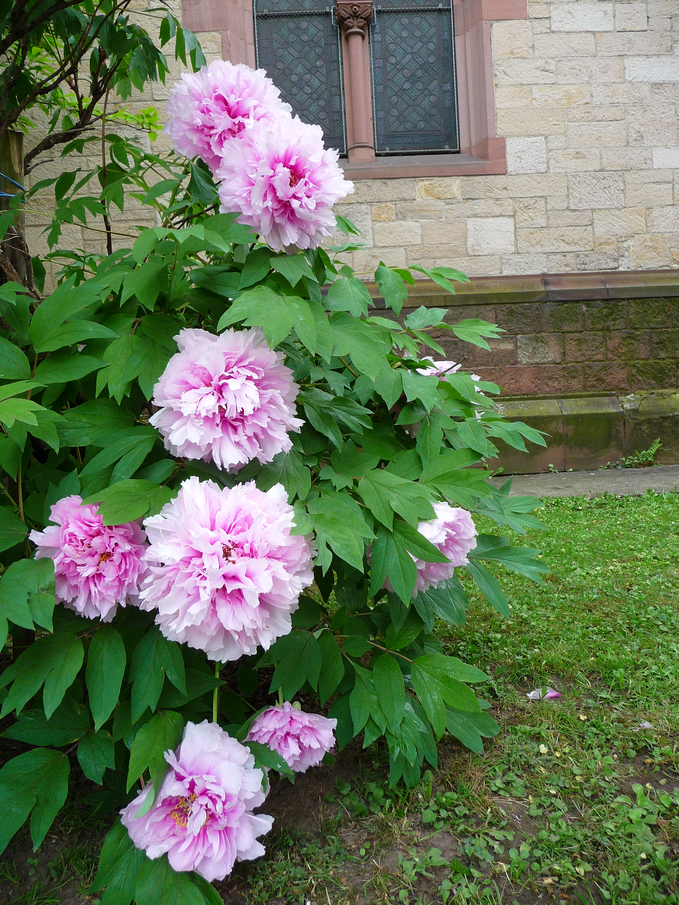 Strauch-Pfingstrose (Paeonia suffruticosa), fotografiert in Heidelberg (Baden-Württemberg, Deutschland)